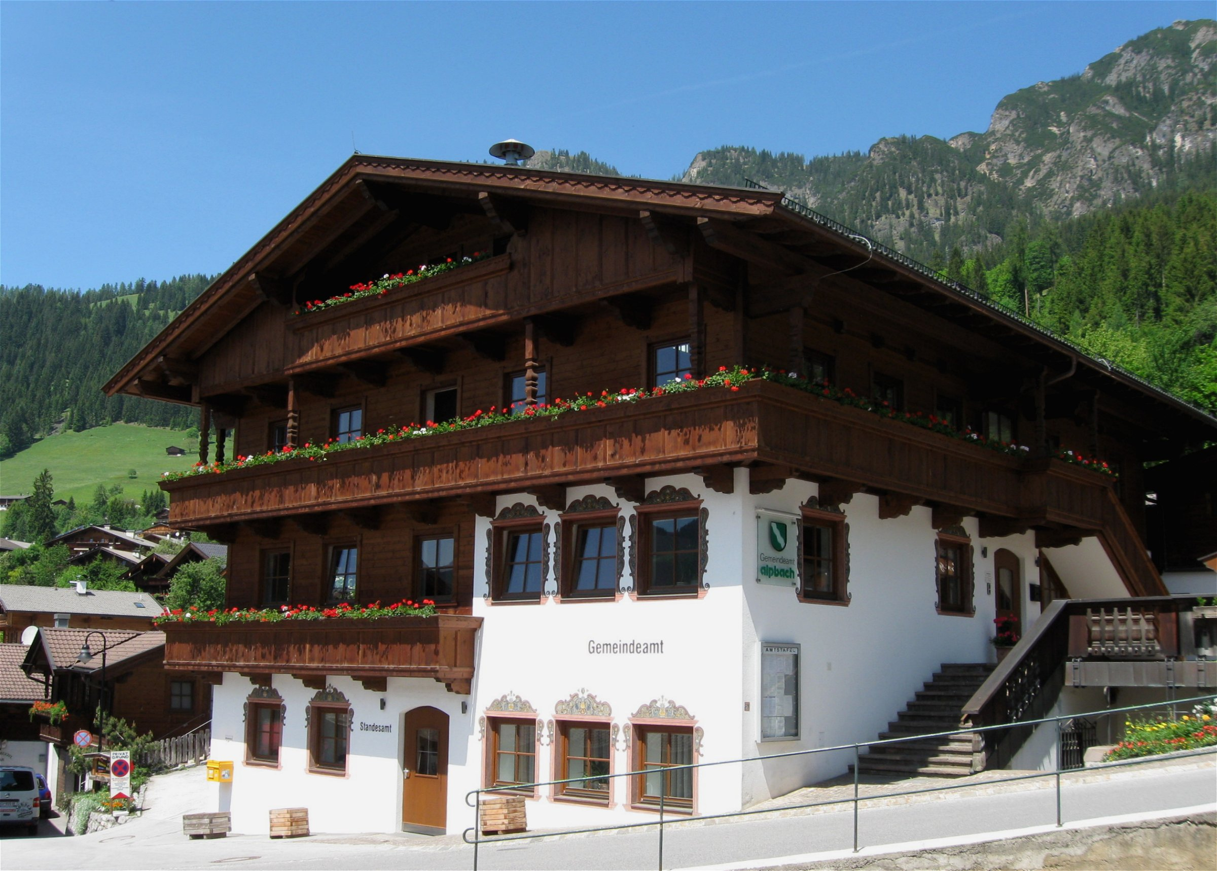 Alpbach, Tirol, Gemeindeamt